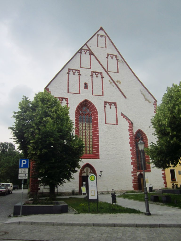 Frontansicht der Stadtkirche Weida